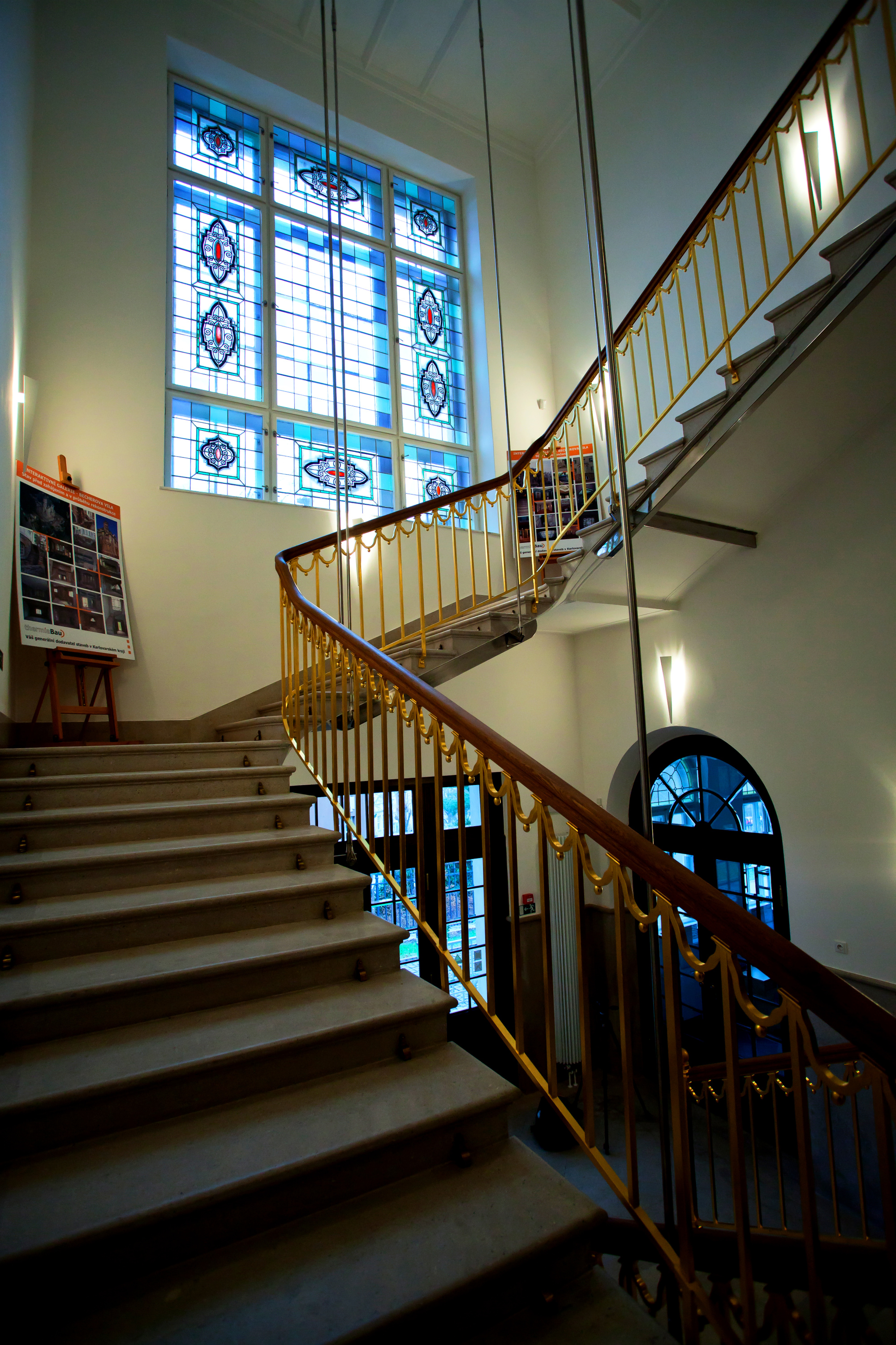 Vila Becher, třída Krále Jiřího 1196/9, Karlovy Vary.